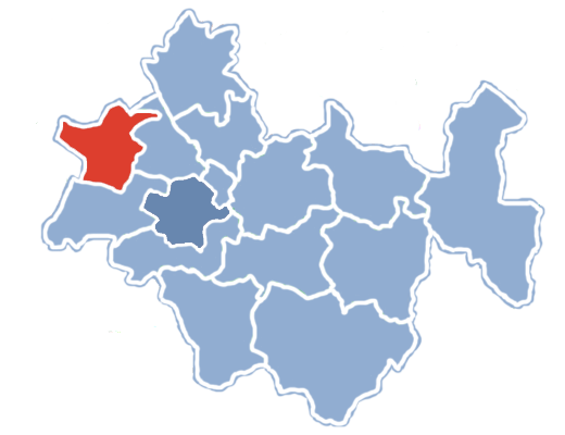 Położenie gminy Lgota Wielka na terenie powiatu radomszczańskiego.